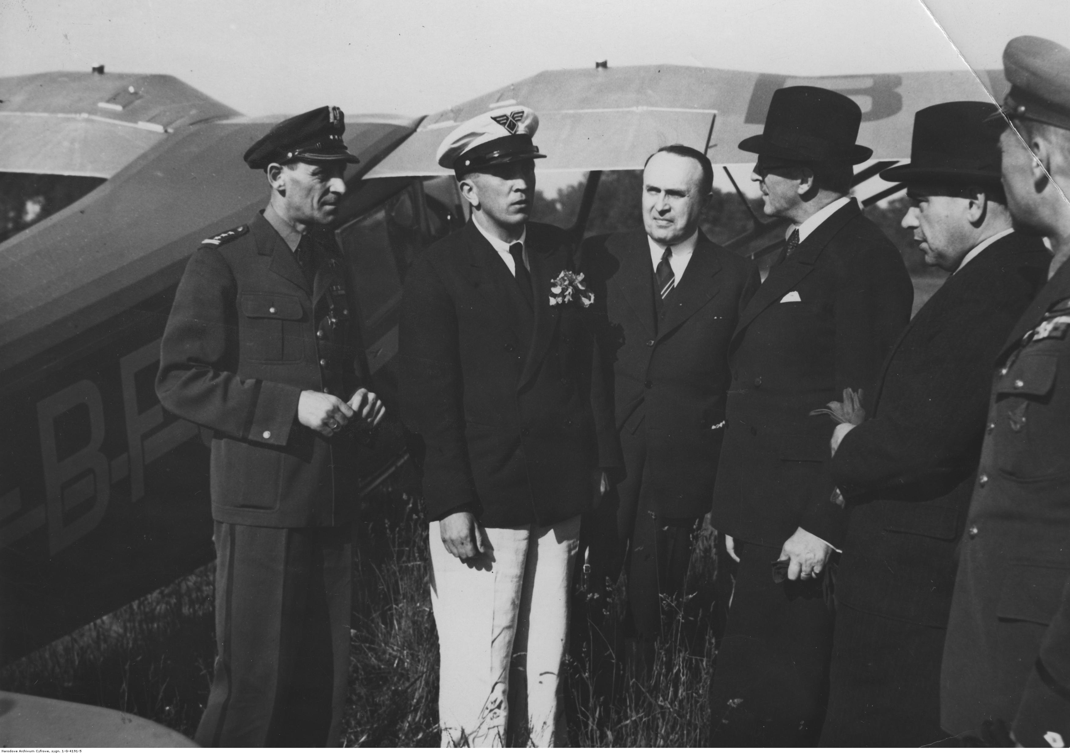 Przelot dyrektora PLL LOT Wacława Makowskiego na samolocie Lockheed L-14 Super Electra na trasie Los Angeles-Ameryka Środkowa-Ameryka Południowa-Atlantyk-Afryka-Rzym. Dyrektor PLL LOT pilot Wacław Makowski w towarzystwie płk. Franciszka Wiedena, mjr. L. Sejferta, wiceministra komunikacji Aleksandra Bobkowskiego i dyrektora technicznego PLL LOT Eugeniusza Rolanda. Koncern Ilustrowany Kurier Codzienny - Archiwum Ilustracji. Sygnatura: 1-G-4191-5